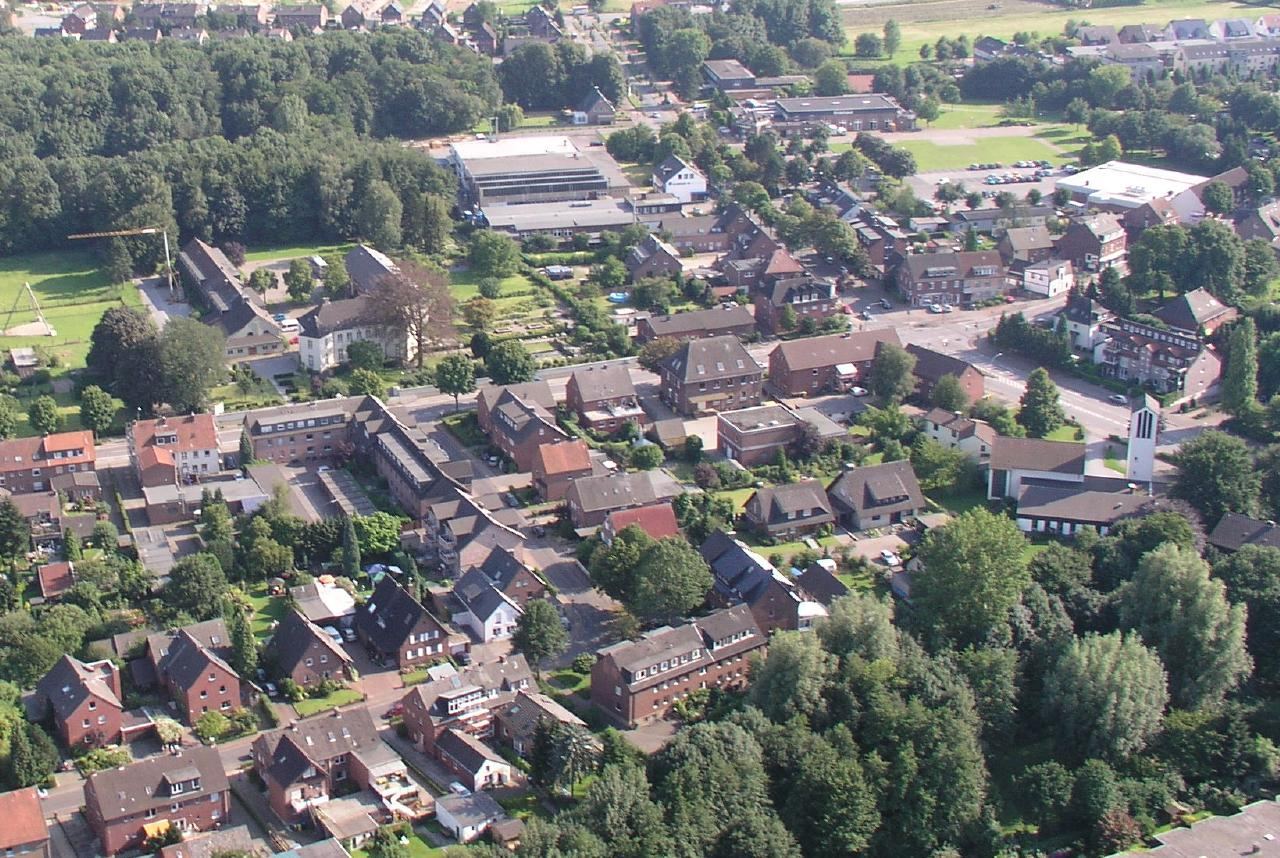 Blick aus der Luft auf das Redemptoristenkloster und die ev. Pauluskirche in Kirchhellen. Weitere Kirchhellenbilder auf